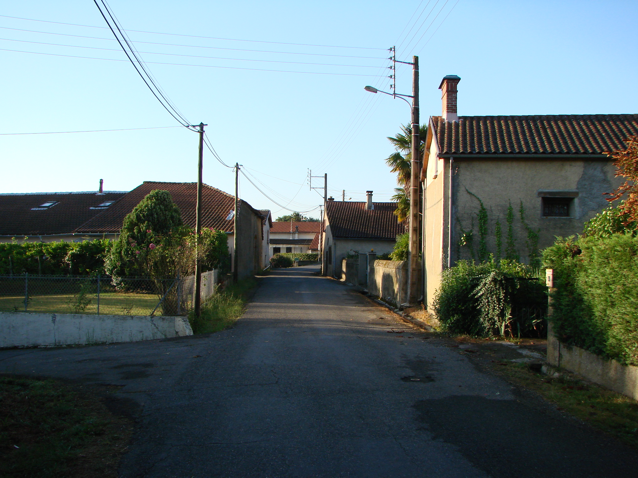 Vue du village de Dours dans les Hautes-Pyrénées (France) : rue principale au centre du village, direction village de Sabalos